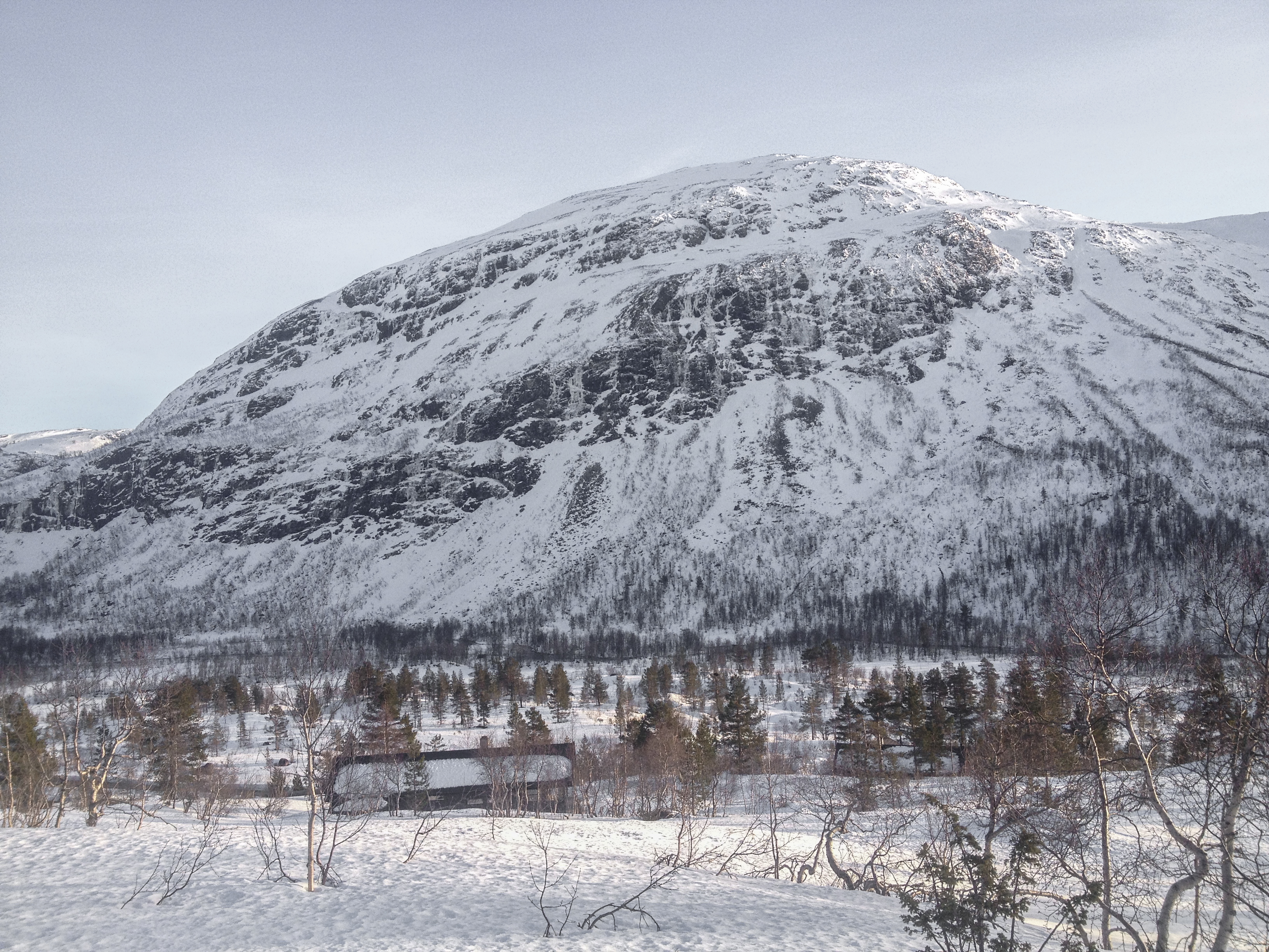 Mjølfjellet